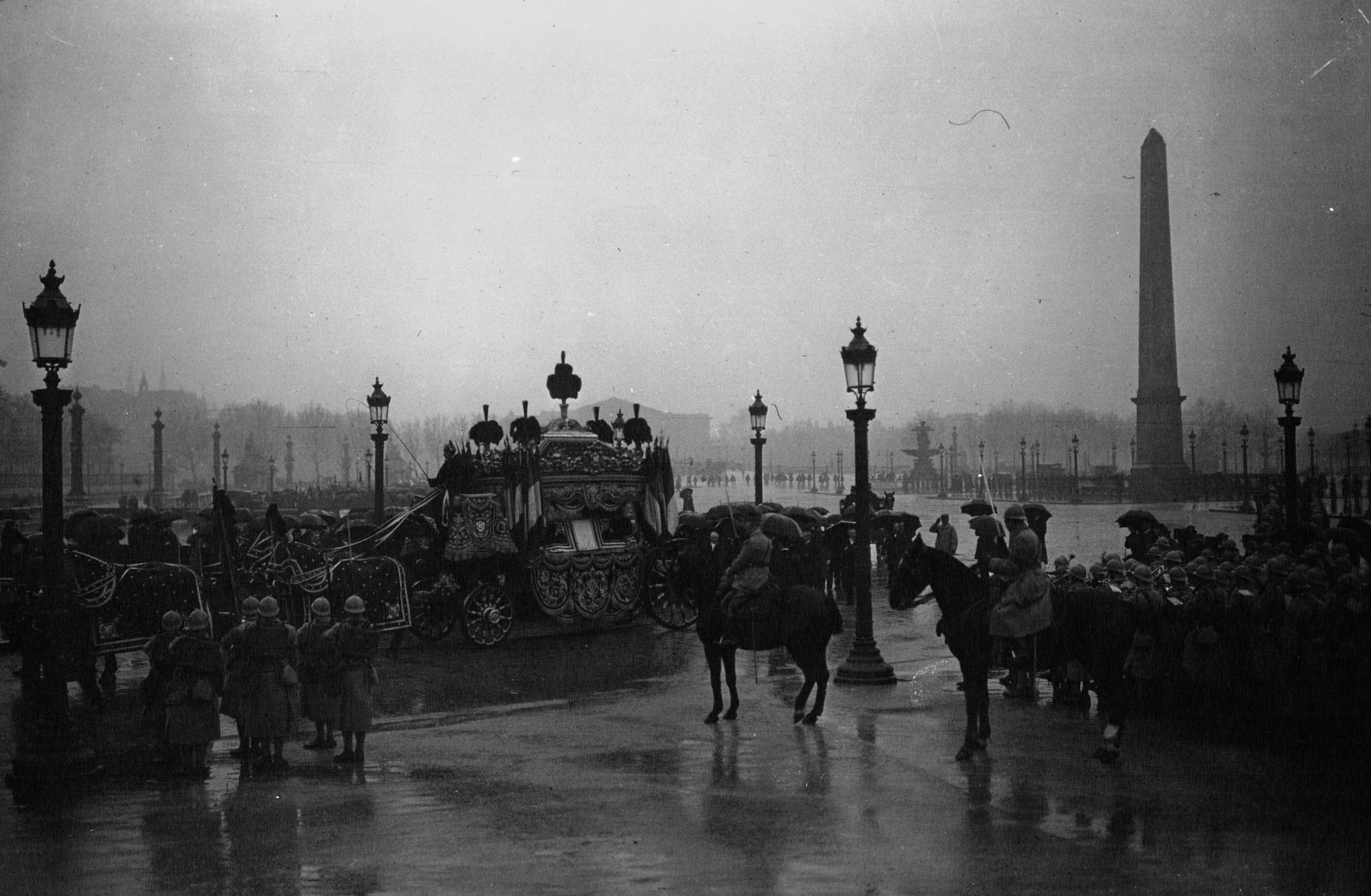 Enterrement de Maurice Barrès en 1923.